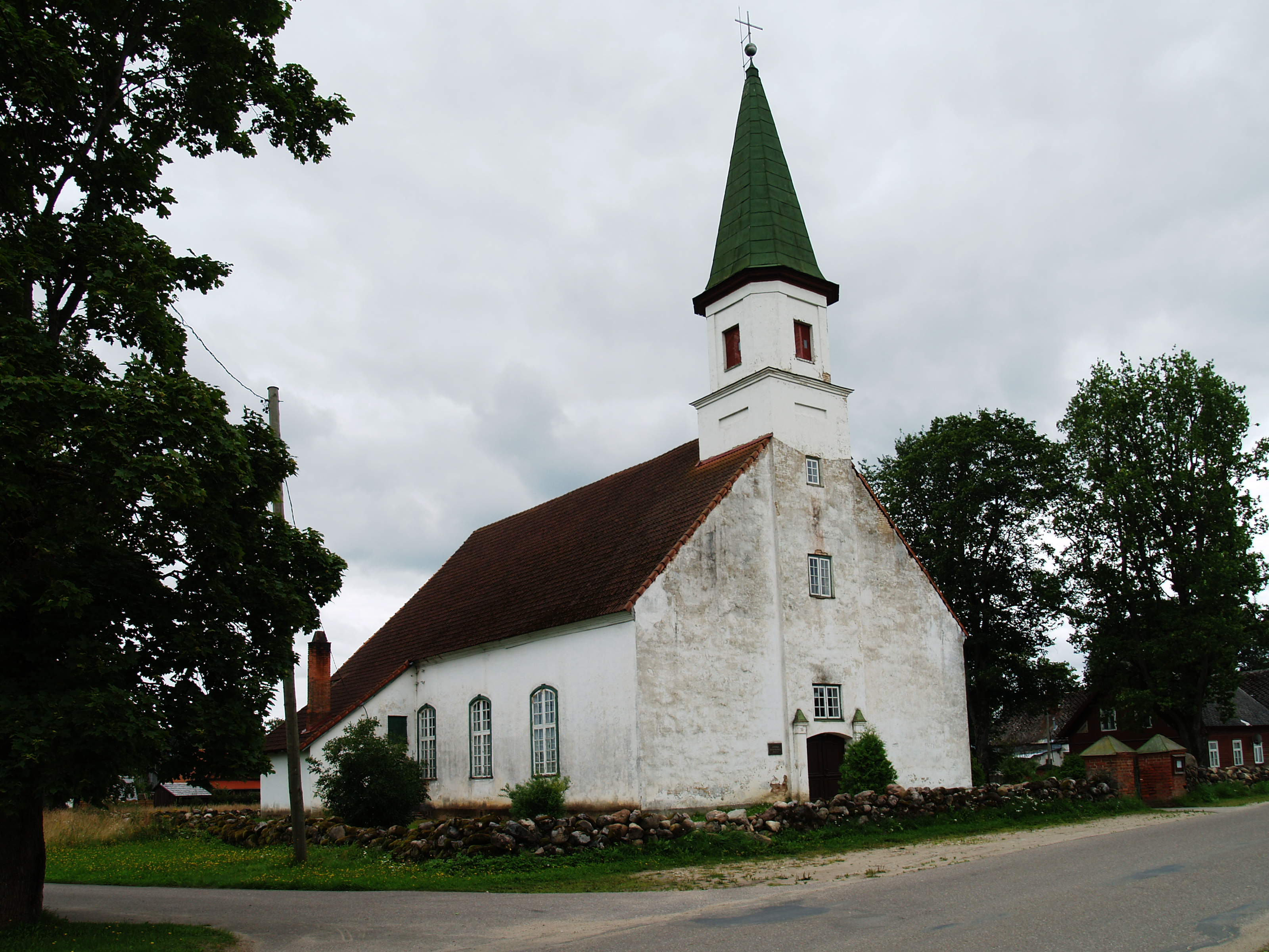 Aloja evangeelne luteriusu kirik